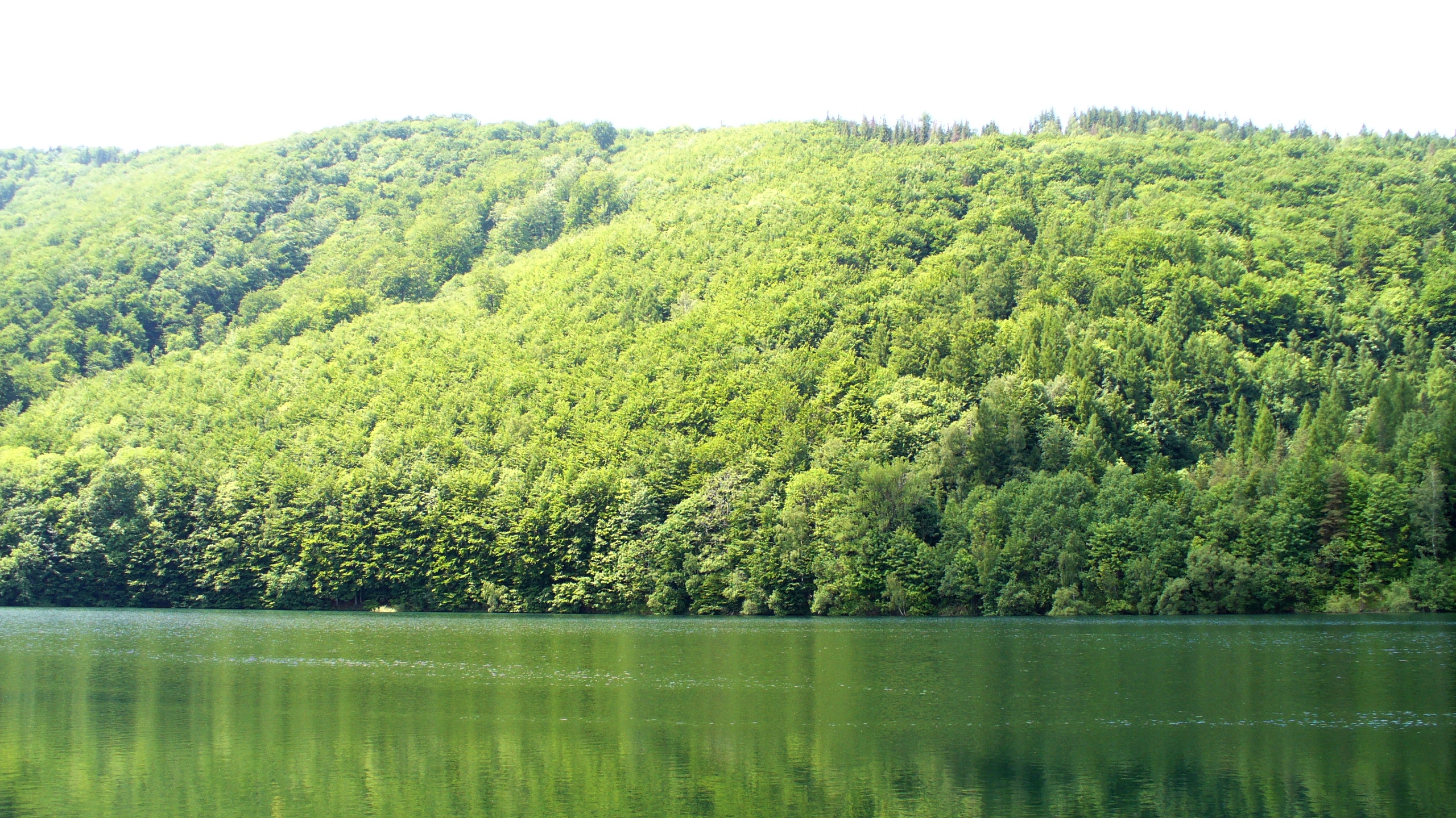 Zbiornik wody pitnej "Wielka Łąka" w Wapienicy.